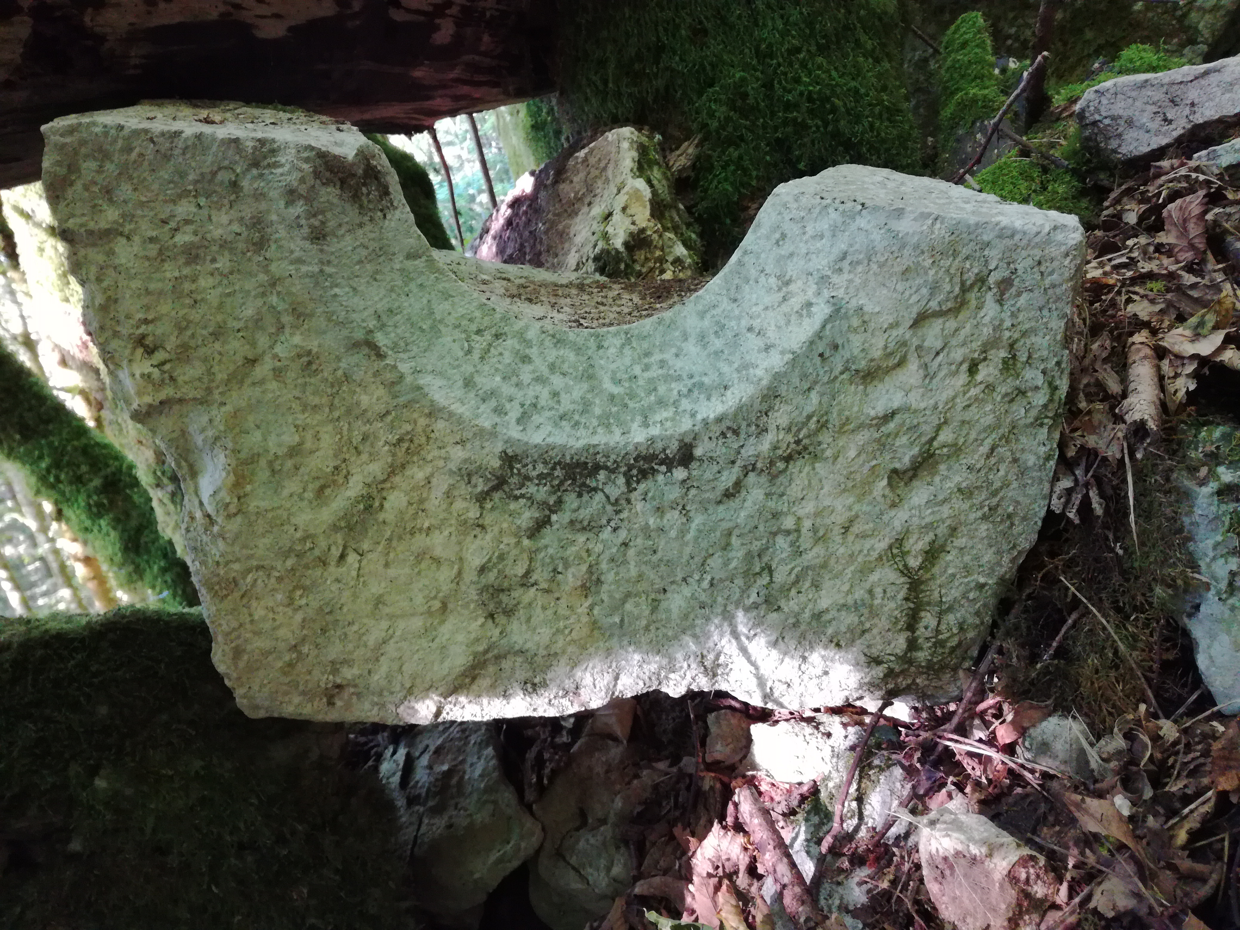 Partie basse d'une bouche à feu gisant au sol (XVIe / XVIIe siècle).